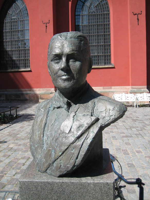 Byst föreställande Jussi Björling, gjord av Pieter de Monchy 1961, rest 1994. Deposition av Kungliga teatern.